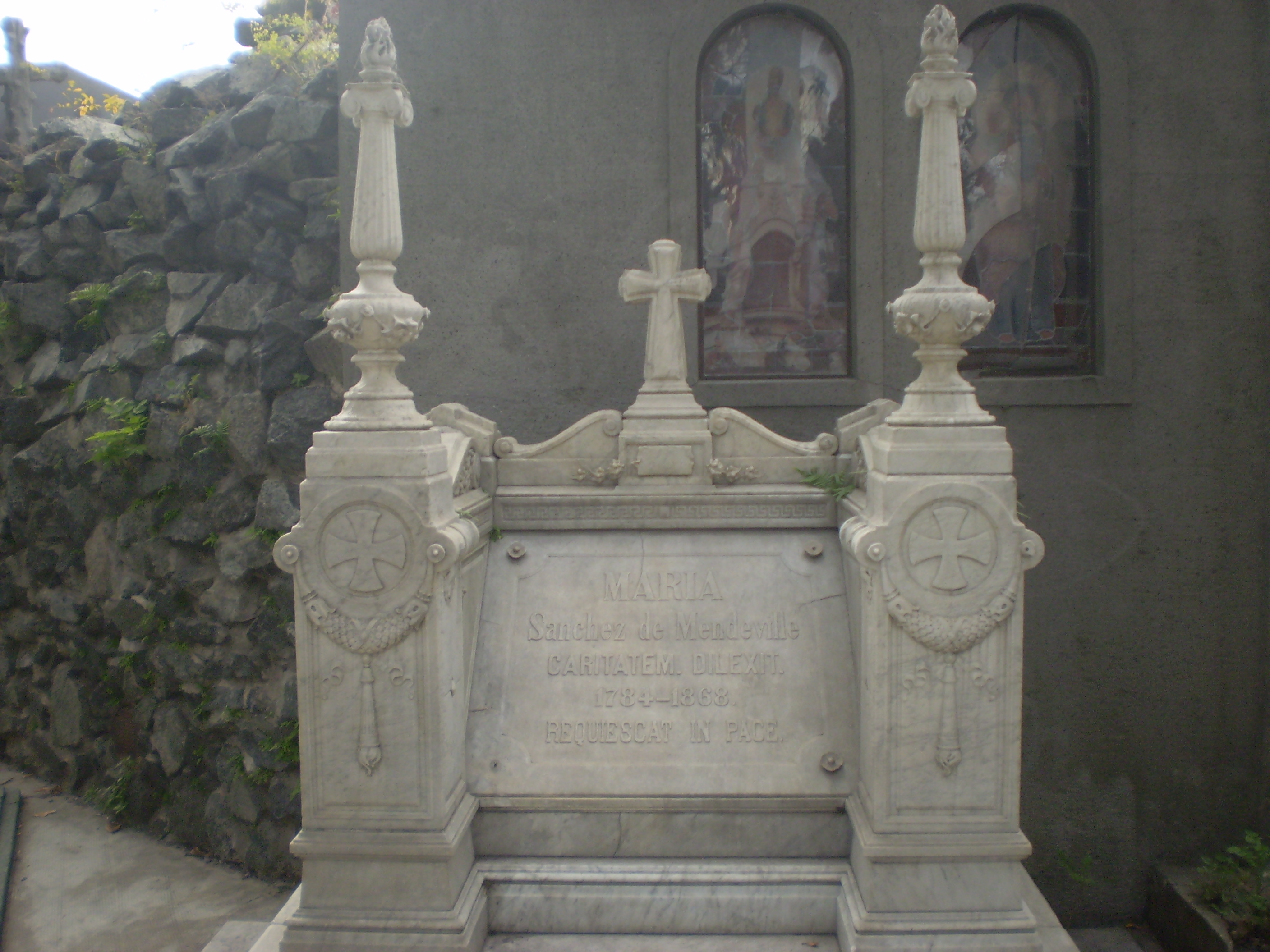 Monumento fúnebre de Mariquita Sanchez de Thompson (luego Mendeville), Cementerio de la Recoleta, Buenos Aires.